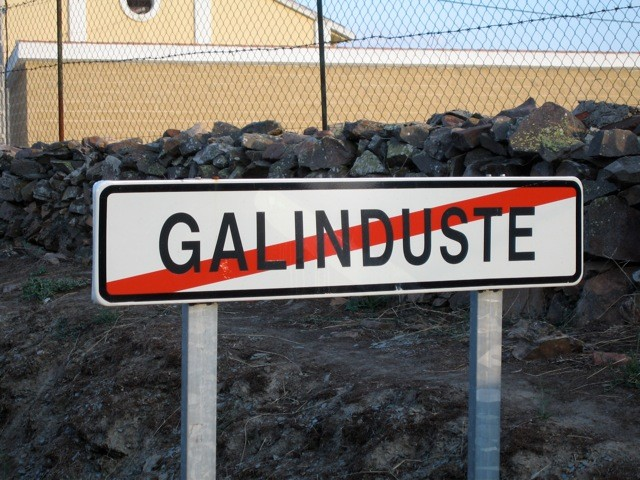 Galindusteren kartela